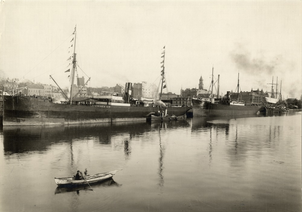 Fartyg förtöjda vid Norra Hamnen i Helsingborg.